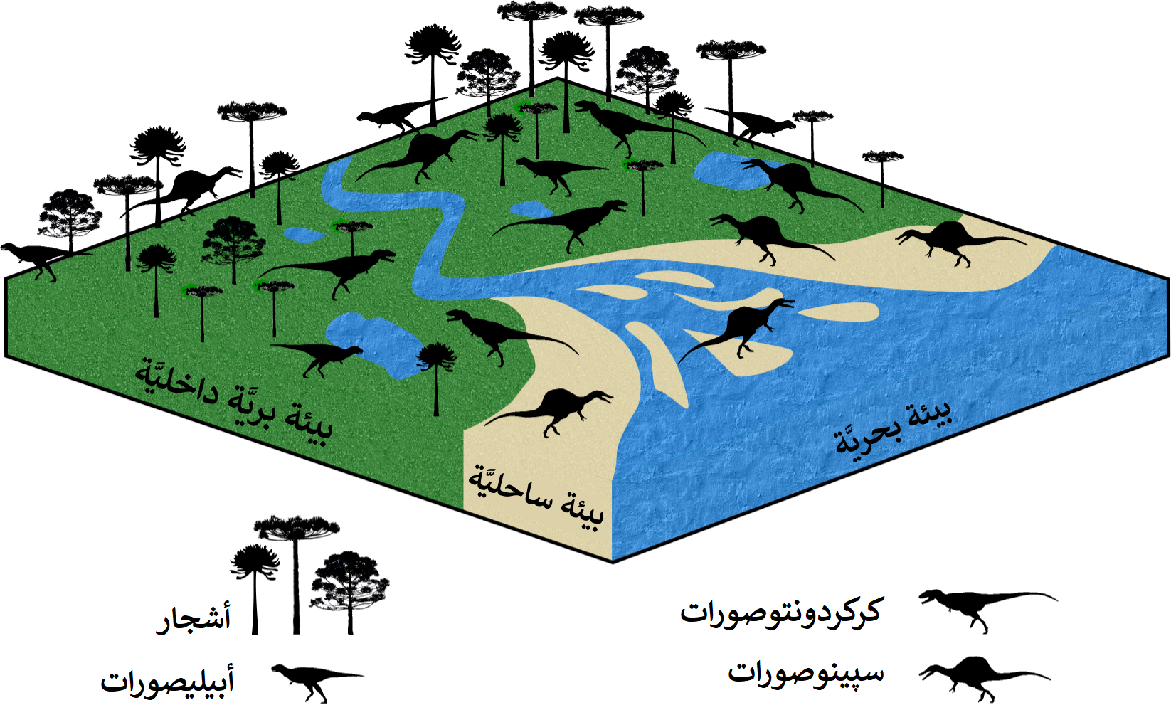 رسمٌ توضيحي تخطيطي يُصُوَّرُ انتشار الأبيليصورات والكركردونتوصورات والسپينوصورات عبر البيئات الساحليَّة والداخليَّة العتيقة. يبدو أنَّ السپينوصورات كانت تقطن الموائل الساحليَّة بِالمقام الأوَّل بينما تشاطرت الأبيليصورات والكركردونتوصورات الموائل الداخليَّة. لاحظ أنَّ مقدار توزيع رُسُومات هذه الكائنات لا يعني أنها كانت تعيش بِجوار بعضها بِهذه الكثافة.